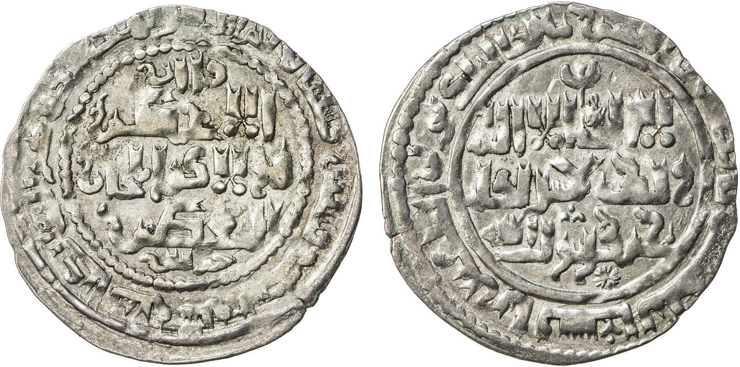 سکه درهم هلاکو خان ضرب ارومیه